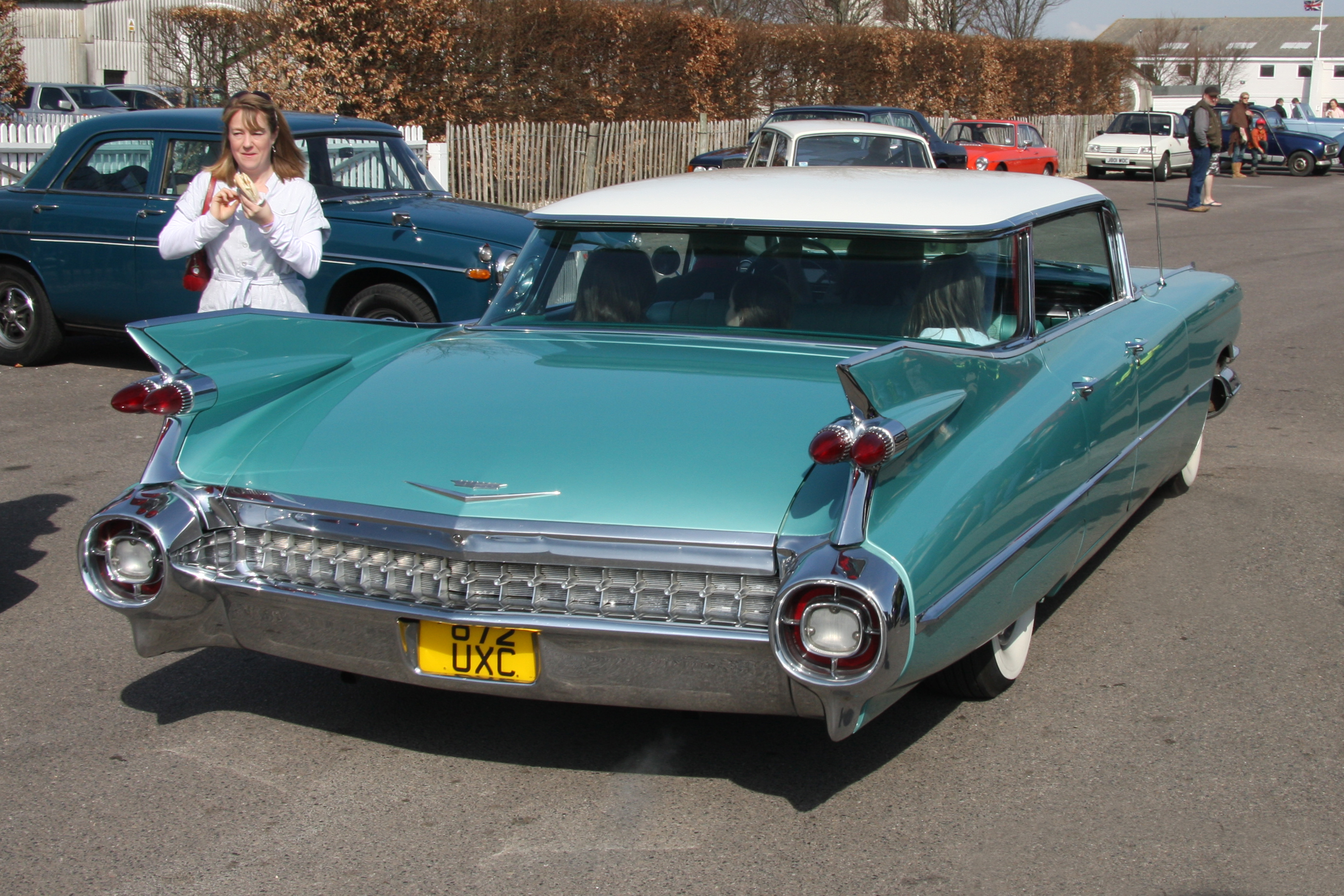 1959 Cadillac Sedan DeVille